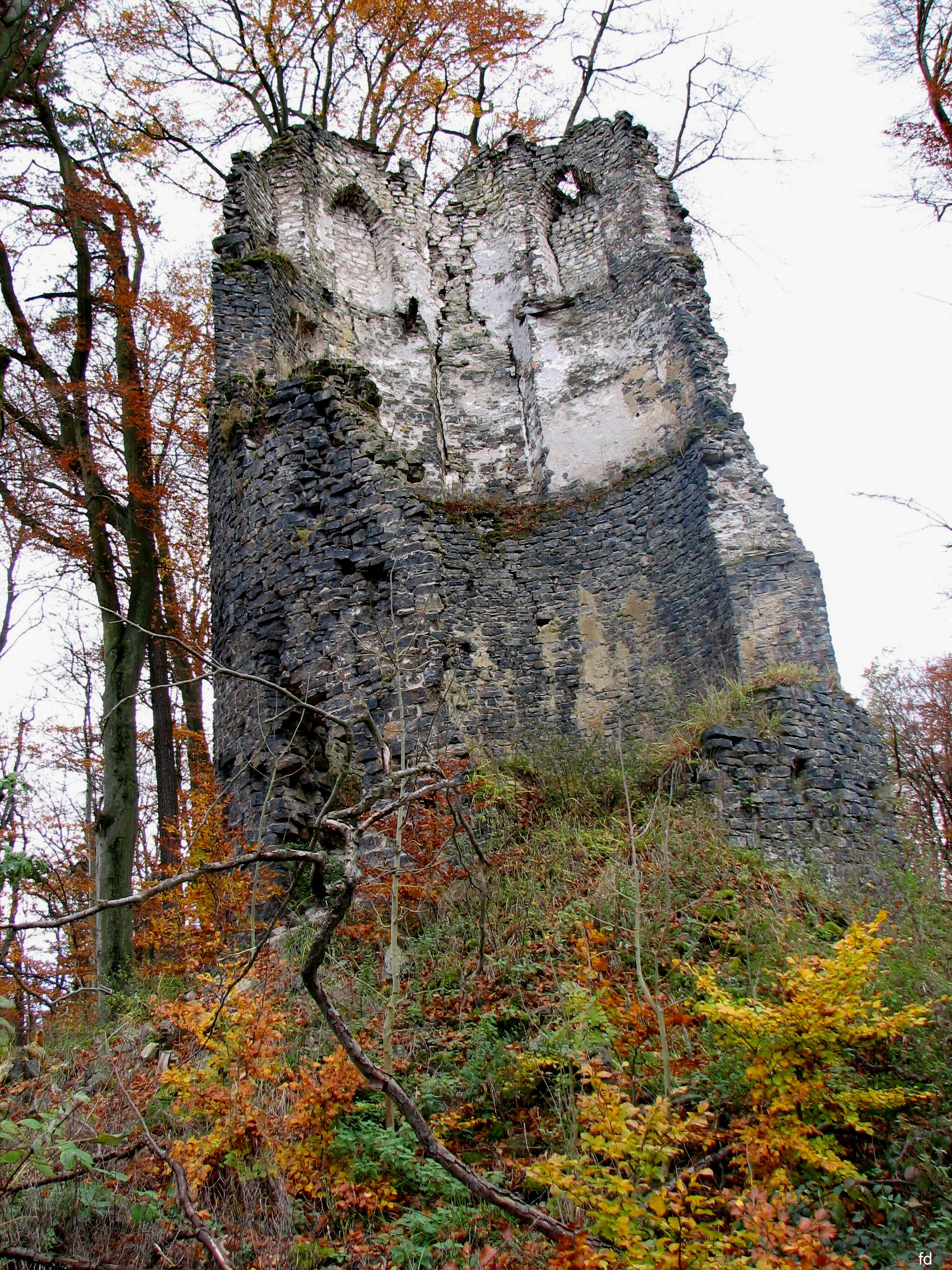 Turmruine auf dem Buchholz 800 m westlich vom Wasserschloß Laer.